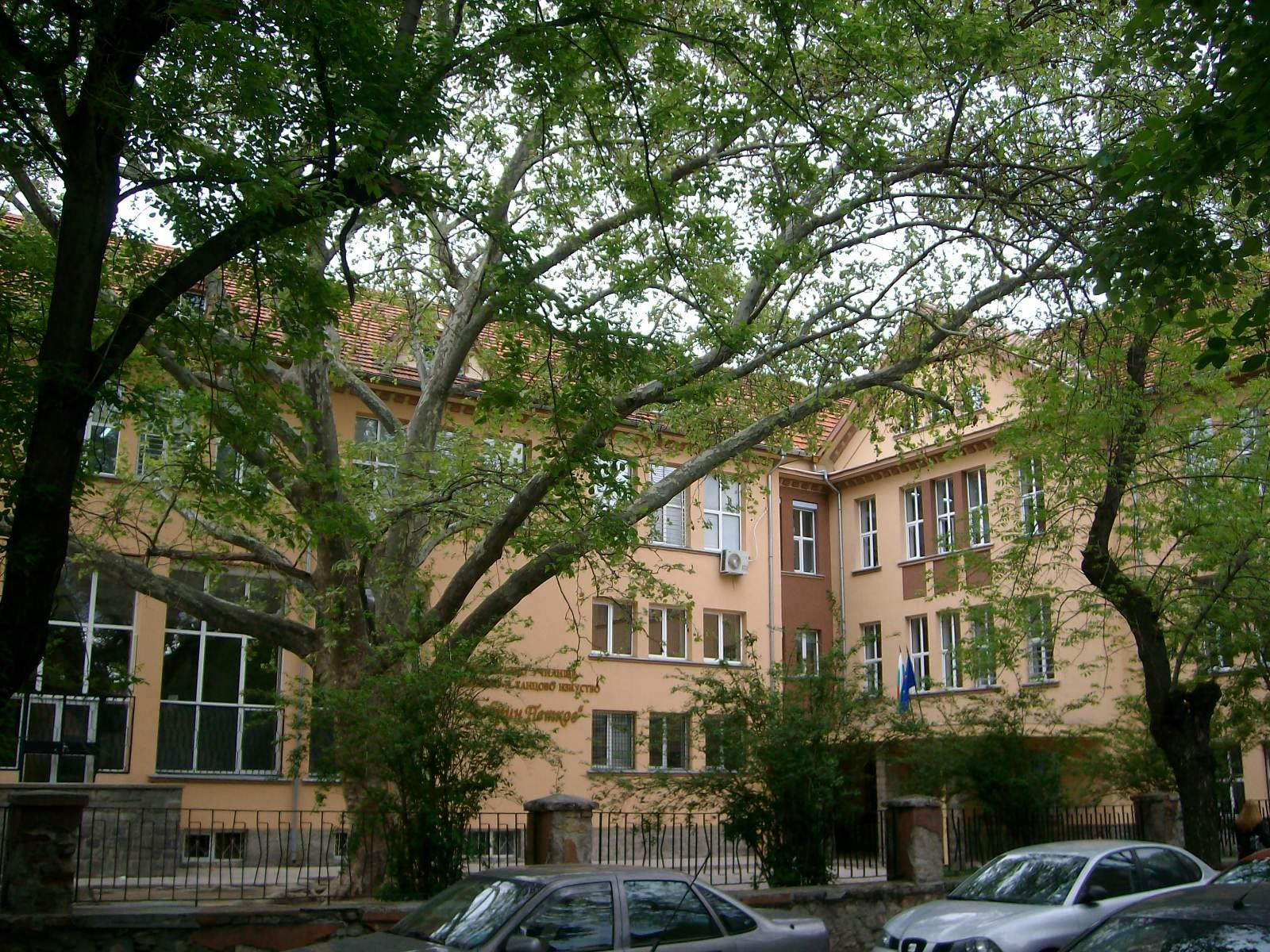 Национално училище за музикално и танцово изкуство / НУМТИ / „Добрин Петков“